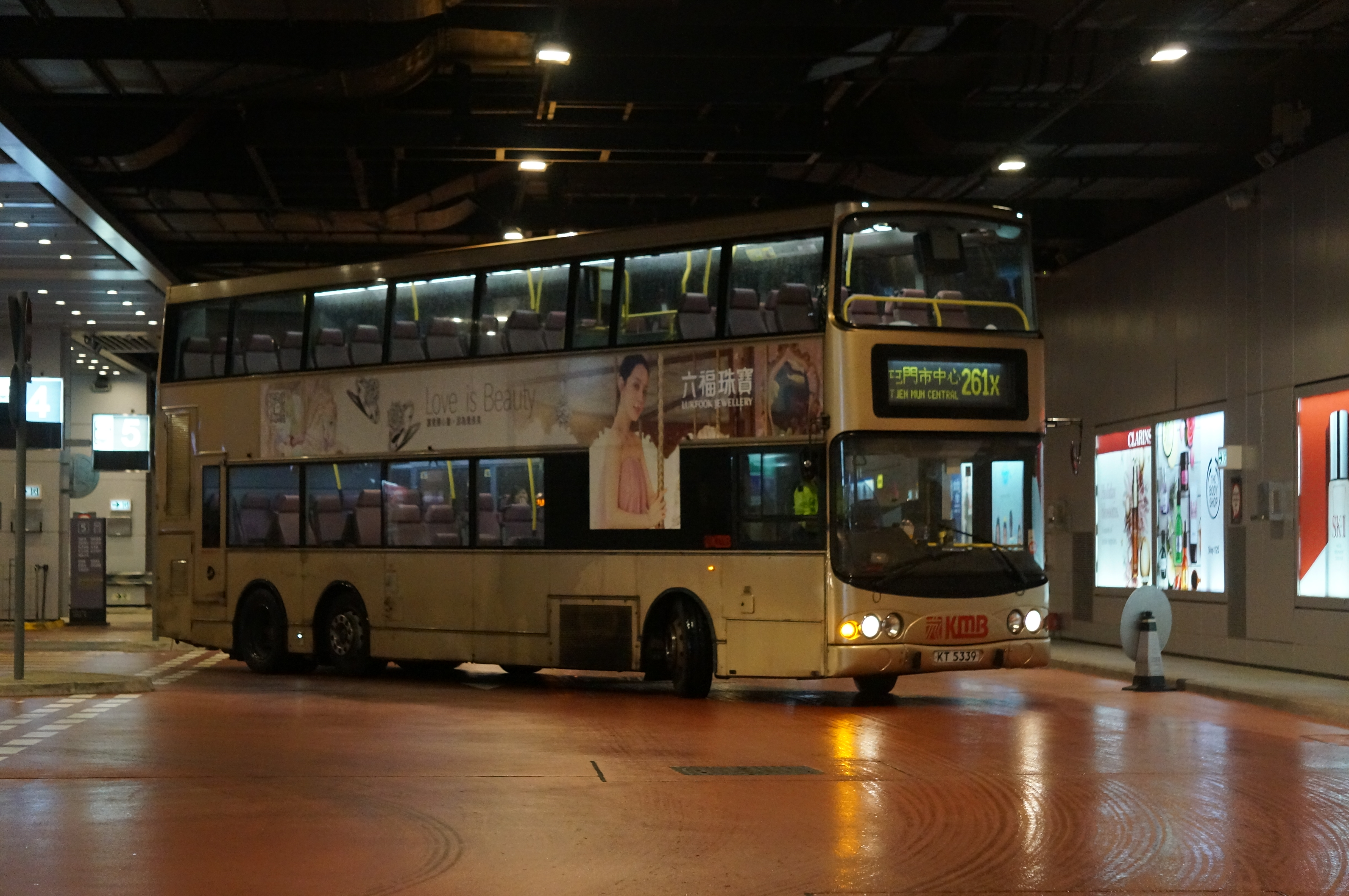 （KT5339/3ASV451）行駛九龍巴士261X線